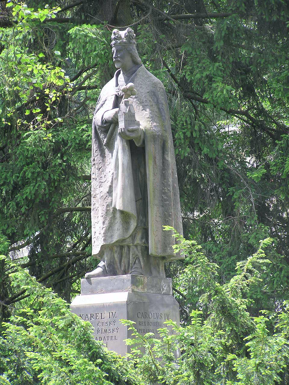 Karlovy Vary (Karlsbad) Denkmal des Stadtgründers Karl IV.